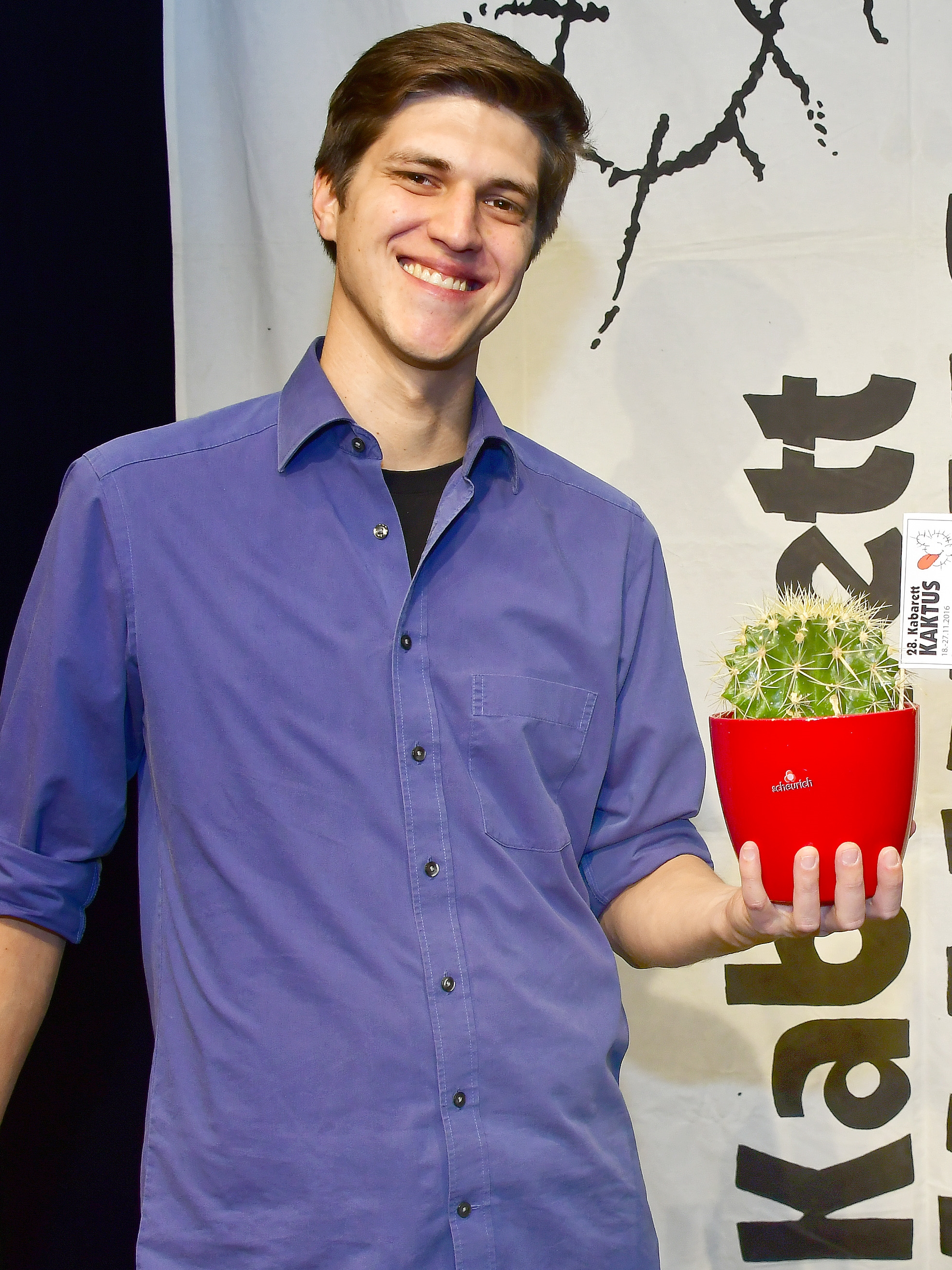 Falk Plücker, Kaktus-Sieger 2016